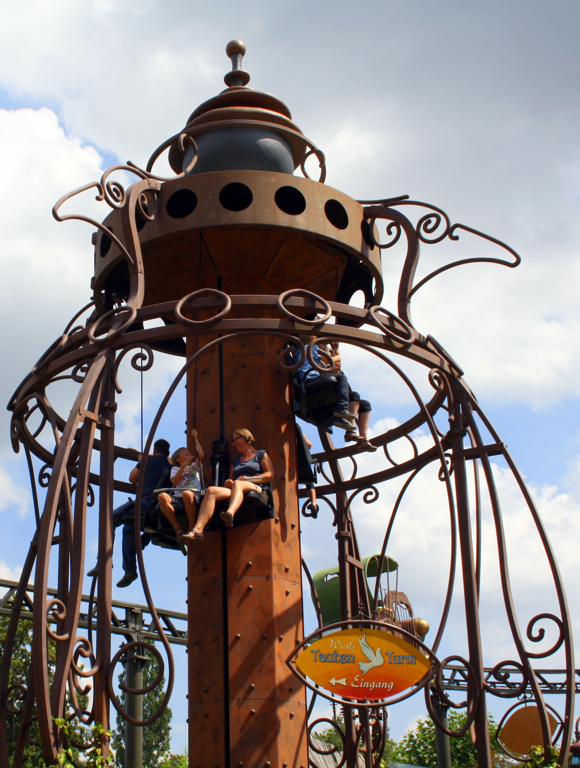 Wirtl’s Taubenturm